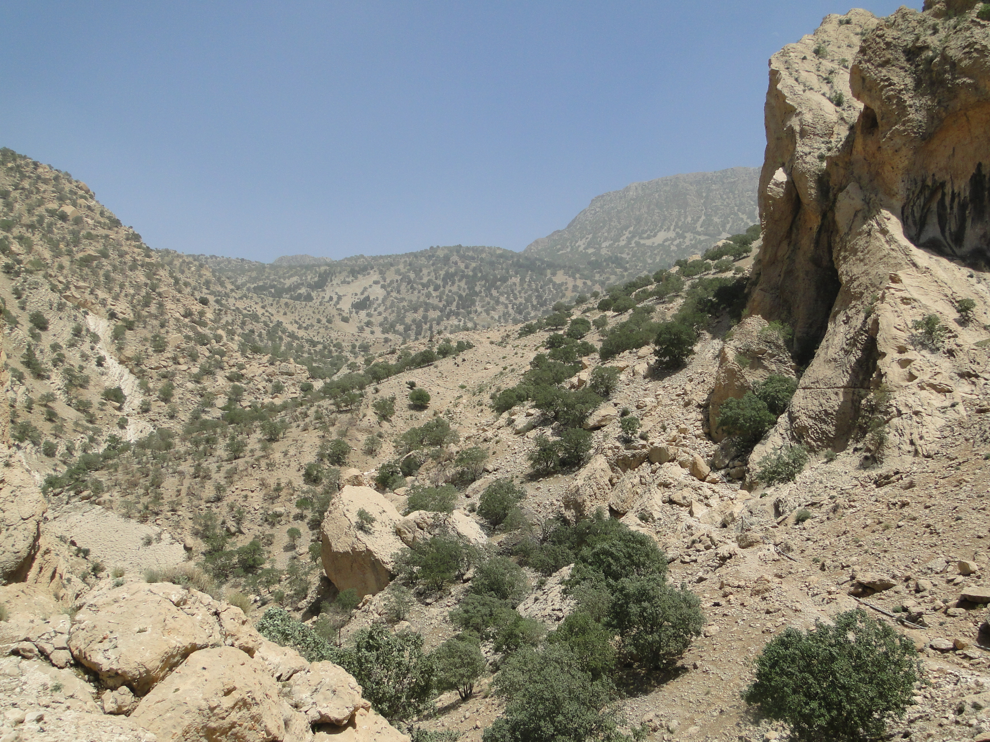 جاذبه های تاریخی شهرستان بهمئی